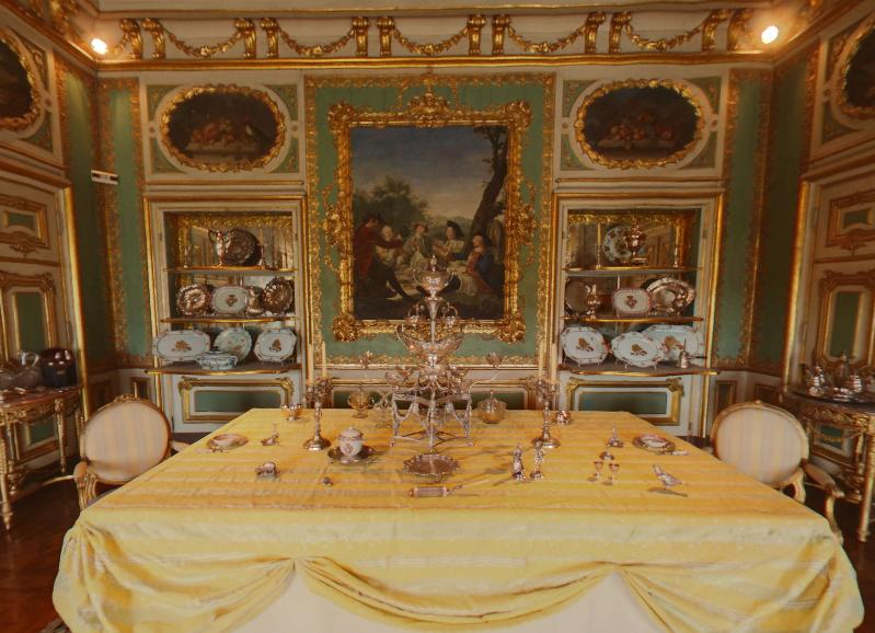 Sala das Merendas do Palácio Real de Queluz